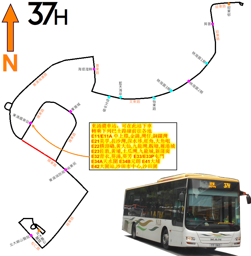 中文（香港）: 新大嶼山巴士37H線的走線圖